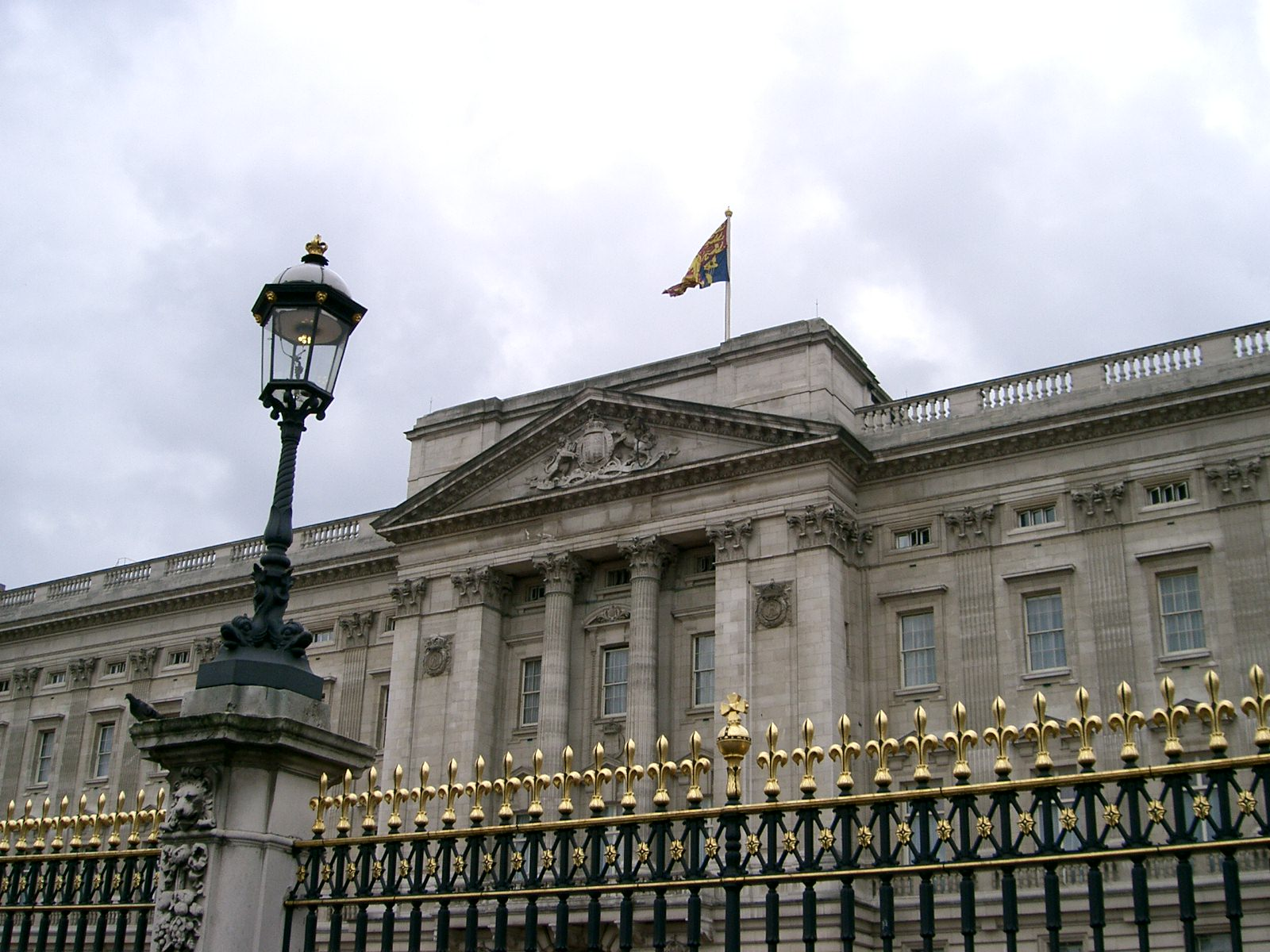 Buckingham Palace